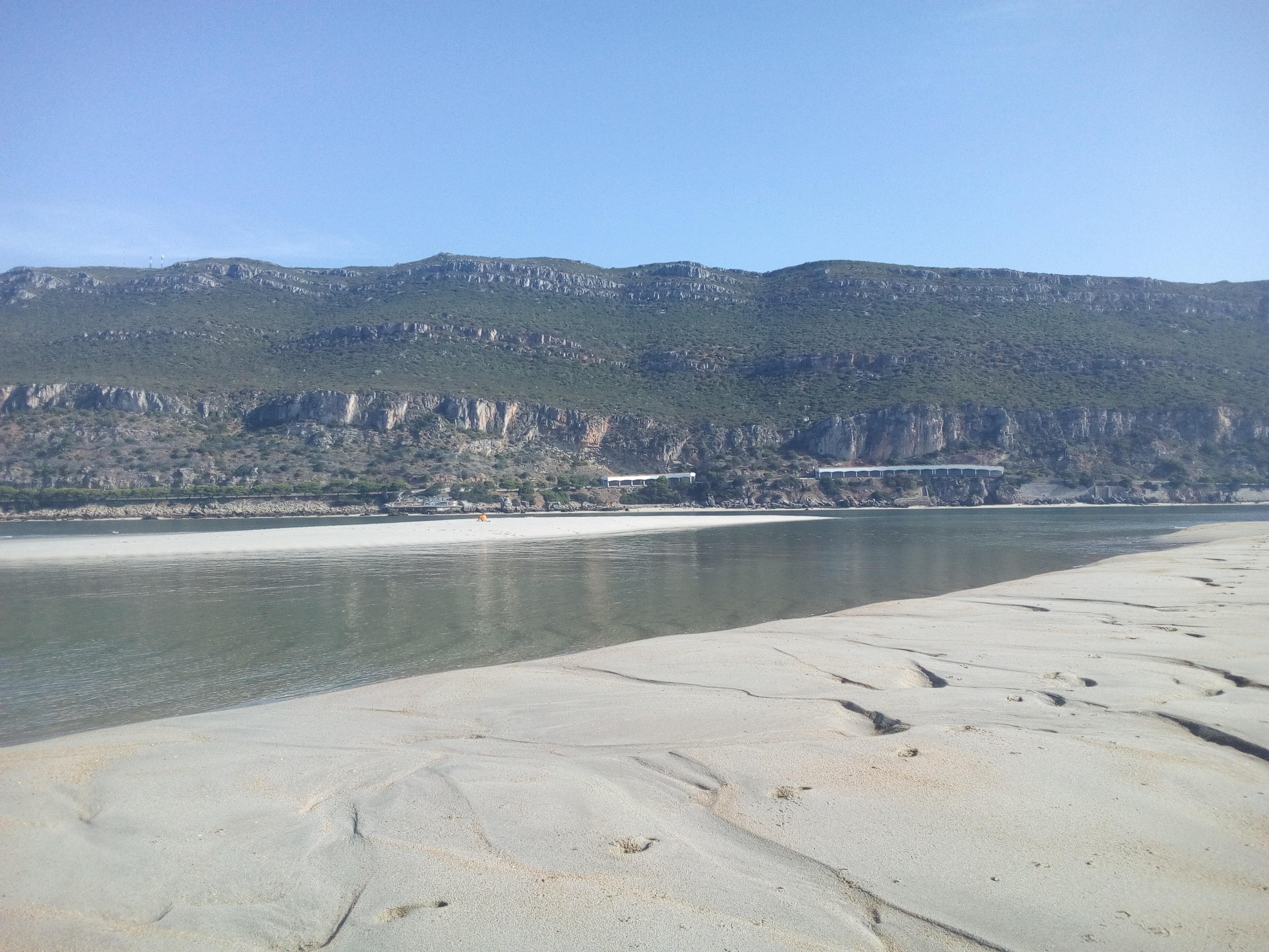 Vista do Banco de areia